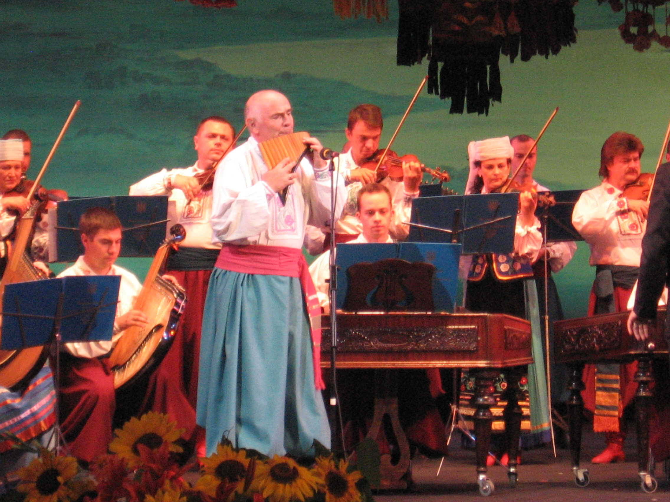 Свіріль